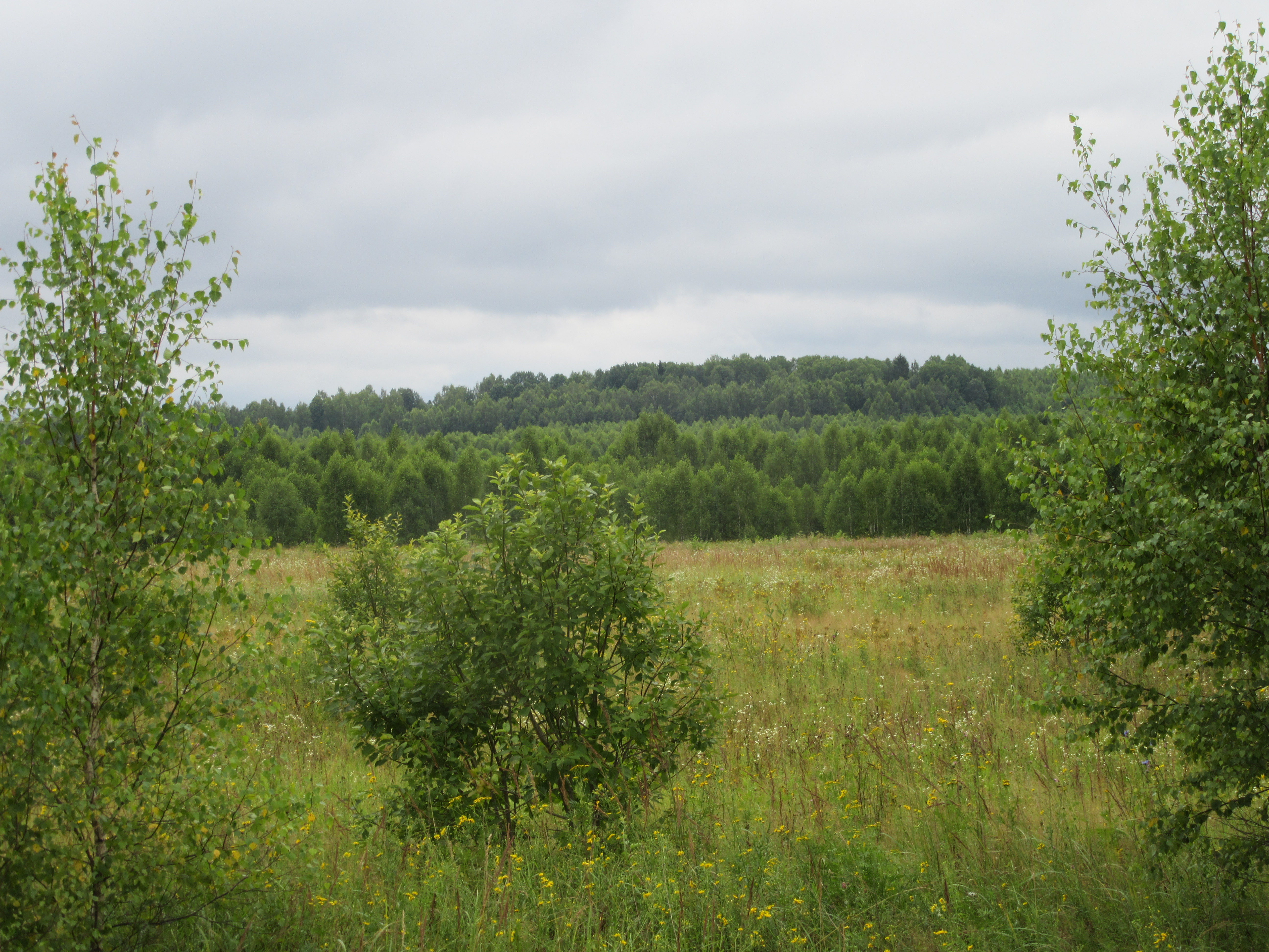 вблизи города Износки